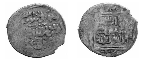 Botan Emiri Abdullah Döneminde Siirt'te kendi adına basılan sikkeler